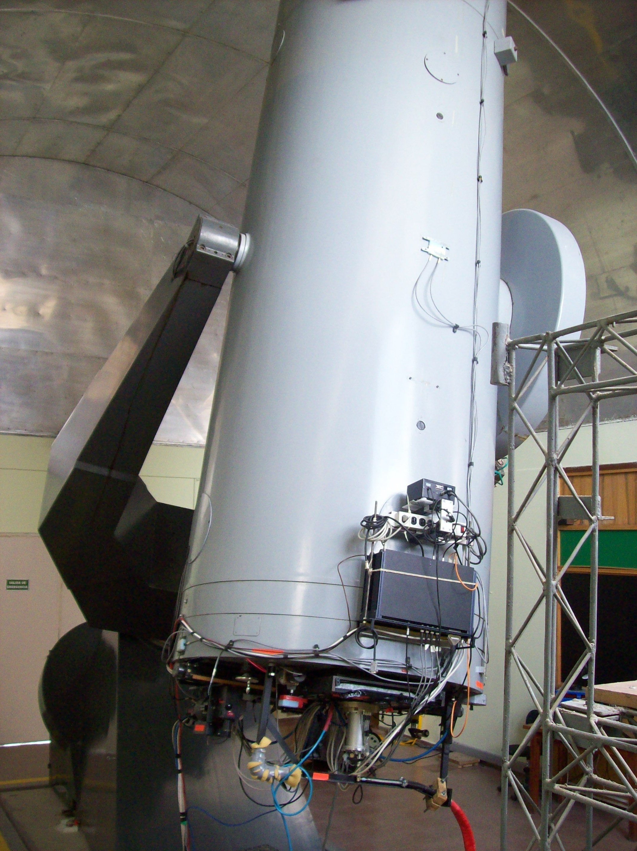 Telescopio del Observatorio Carlos Cesco en el Parque Nacional El Leoncito, Departamento Calingasta, Provincia de San Juan, Argentina.